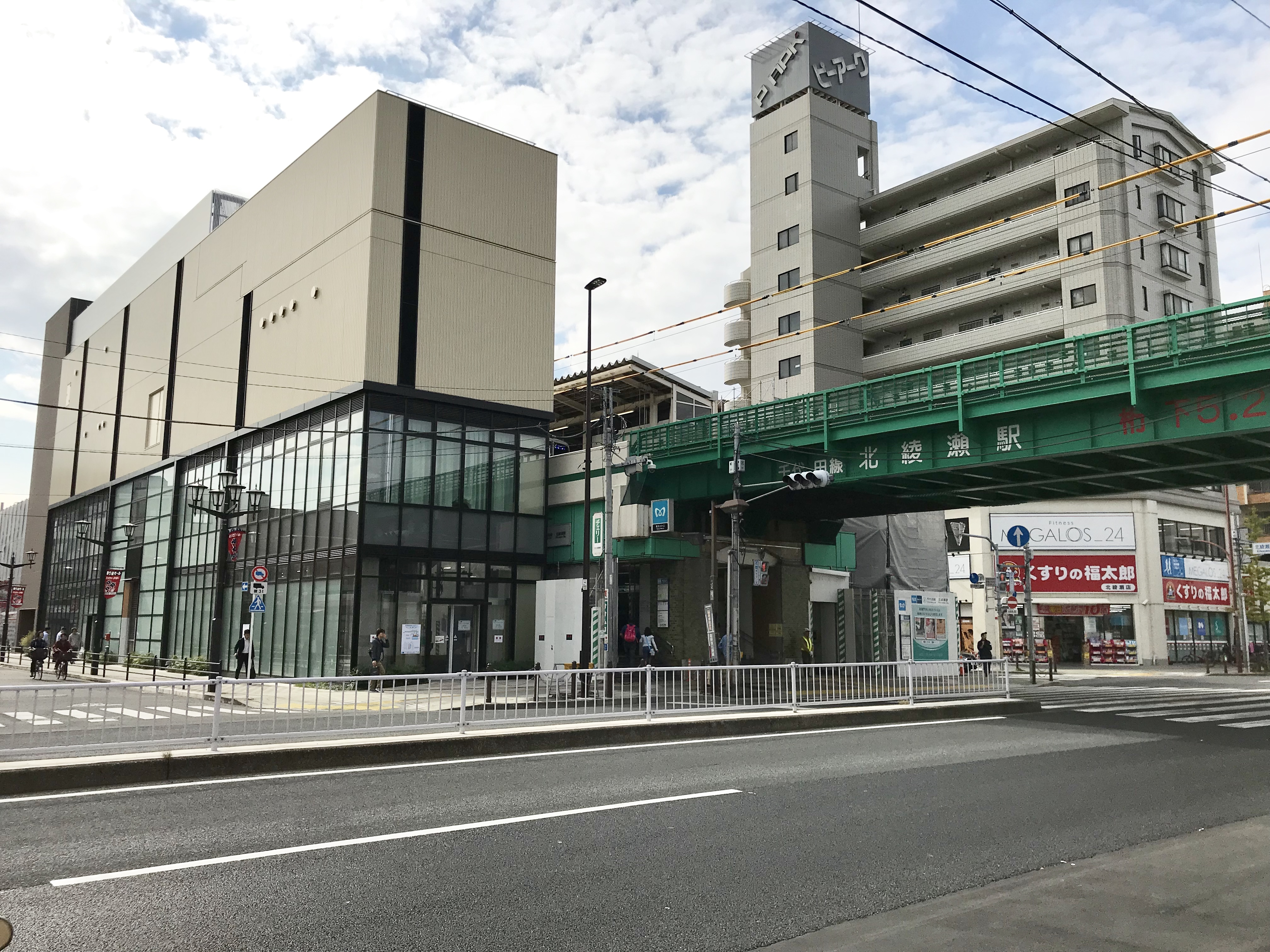 東京メトロ千代田線北綾瀬駅駅舎